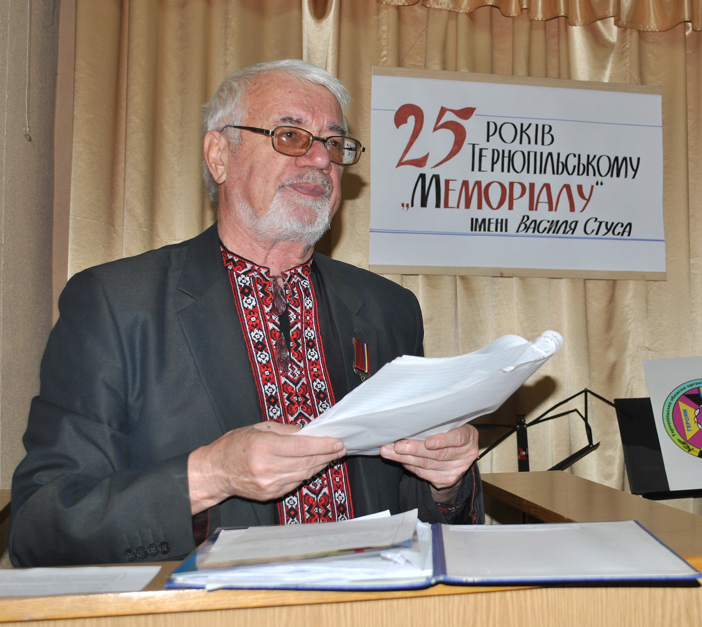 Український архівіст, філолог, краєзнавець, культурно-громадський діяч, голова тернопільського «Меморіалу» Богдан-Роман Васильович Хаварівський.